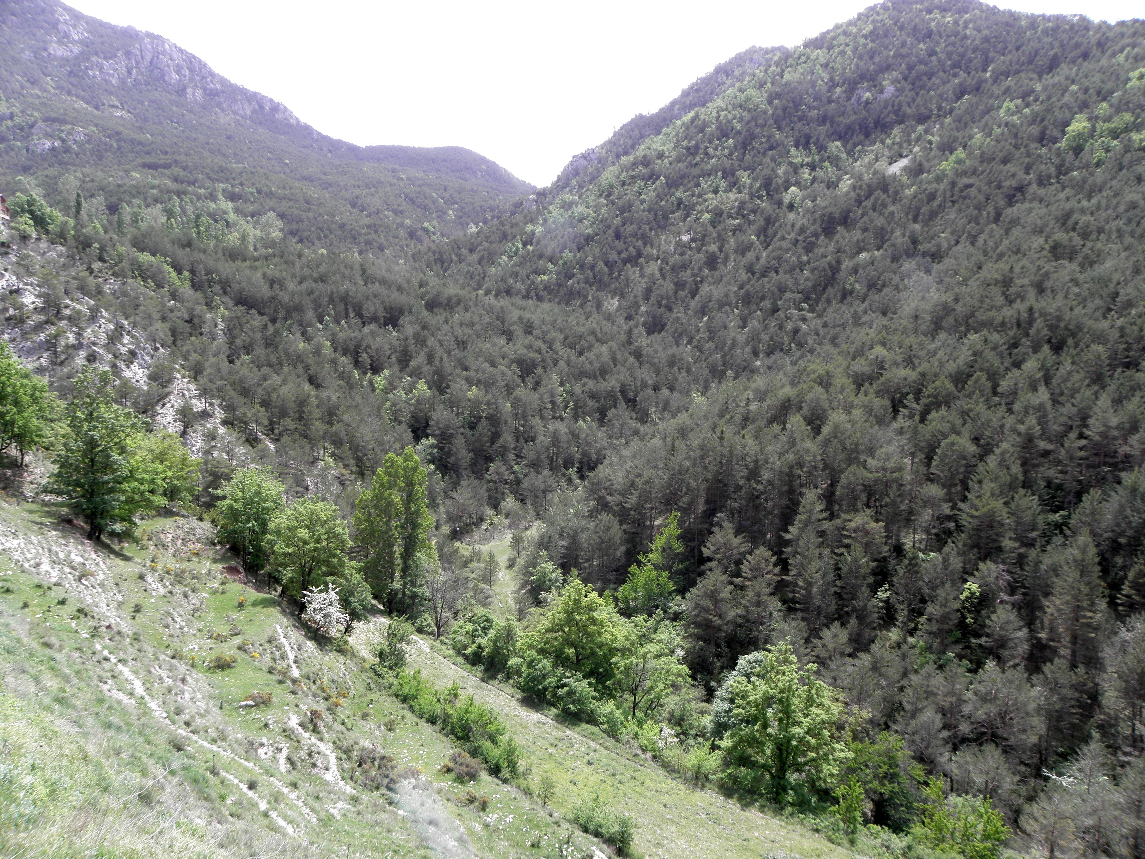 La vall de la capçalera del Riuet de la Pedra, a la Vall de Lord (Solsonès), vista des del nucli de la Pedra.